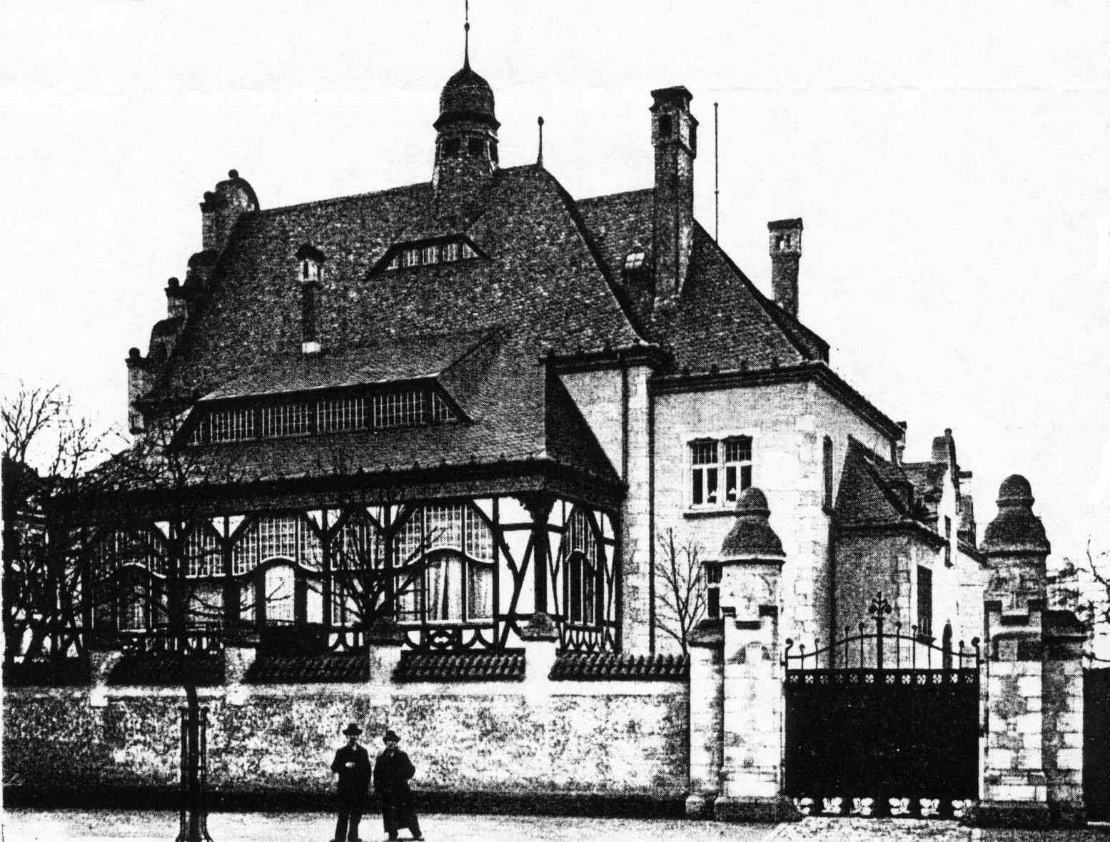 Offiziersvilla des Gardefüsilier-Regiments in Berlin-Mitte des Architekten August Menken (1858-1903). Ansicht Ecke Chaussee- und Kesselstrasse, erbaut 1903-1905 (zerstört). Putzbau mit Fachwerk, Historismus (Neugotik).